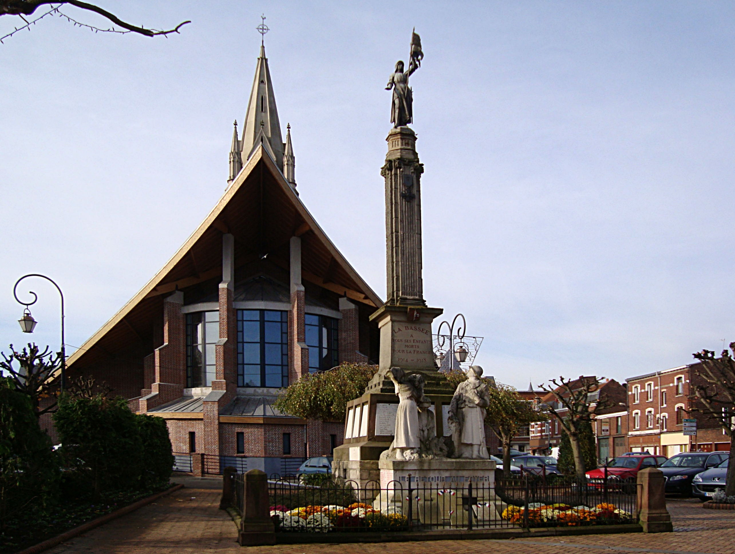 Le monument aux morts de La Bassée (Nord).